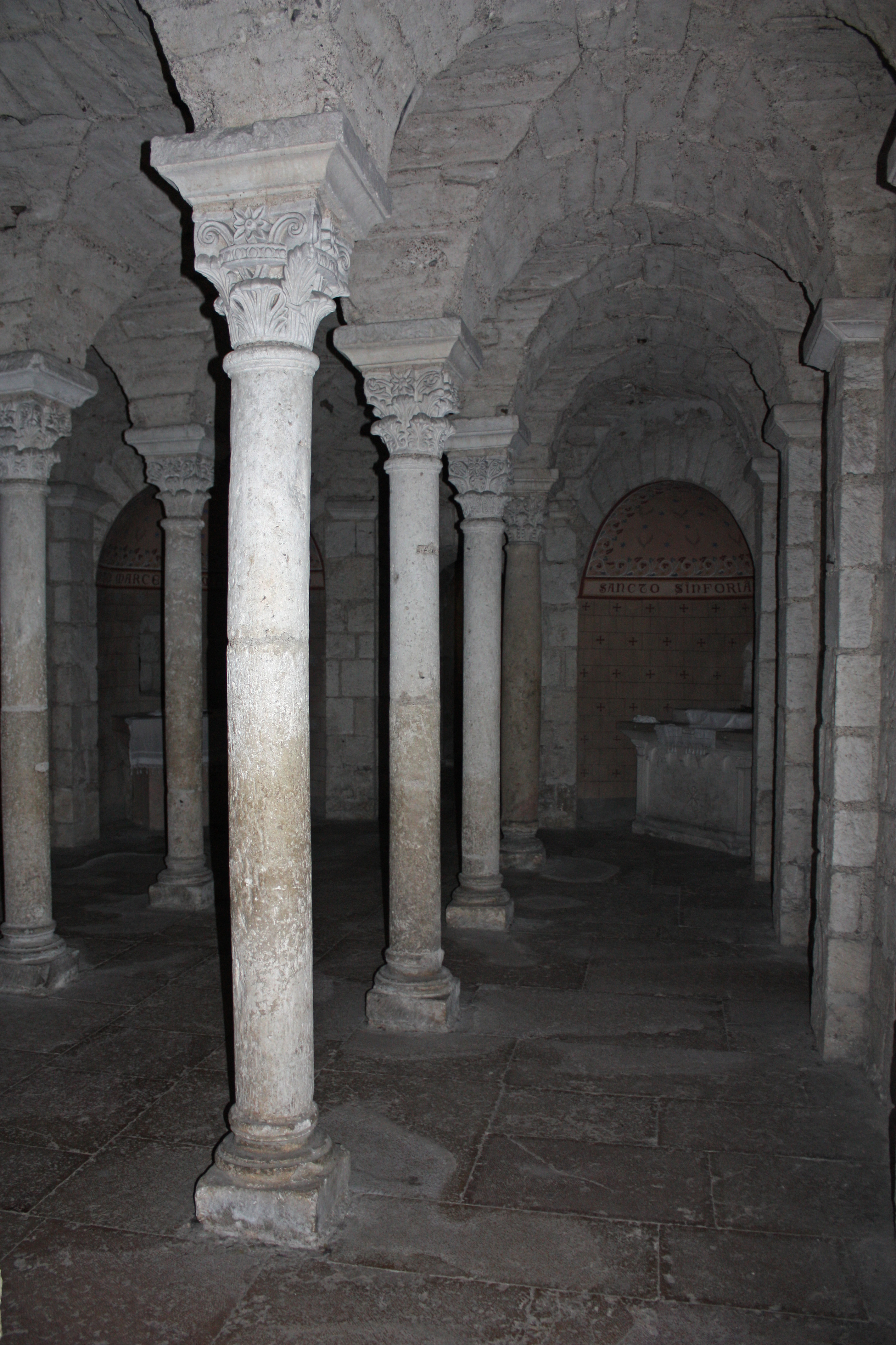 Colonnade de la crypte